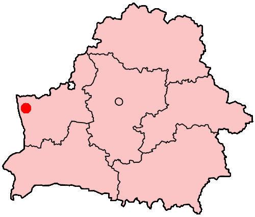 Grodno na mapie Białorusi